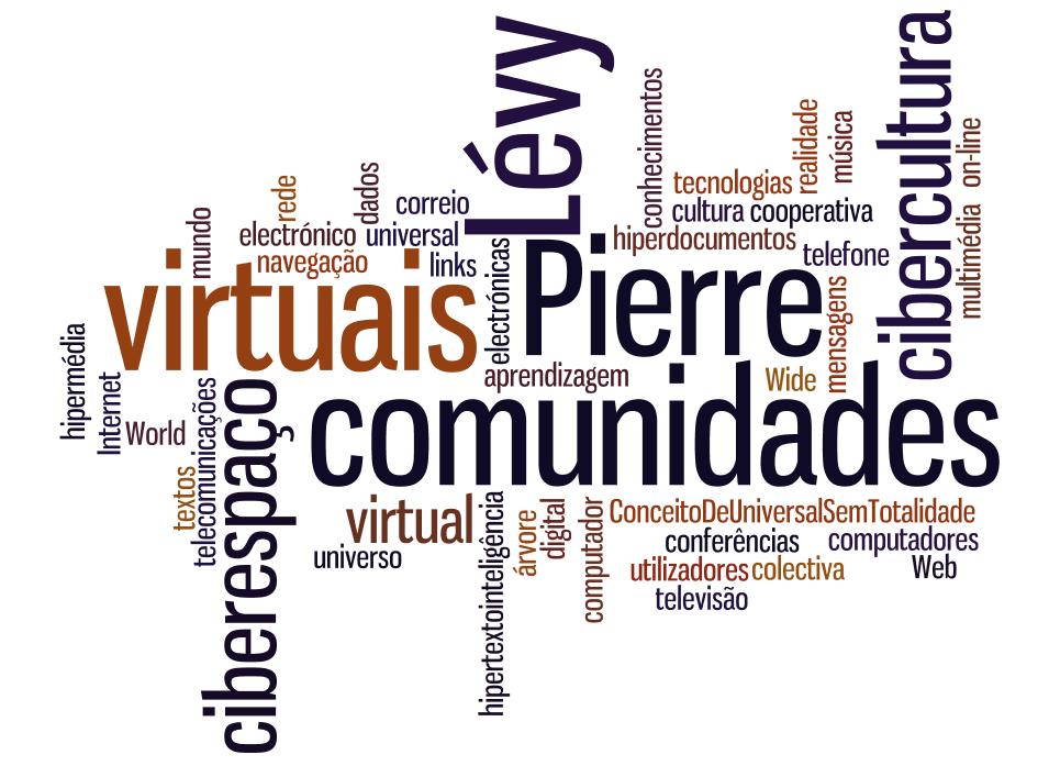 ciber cultura